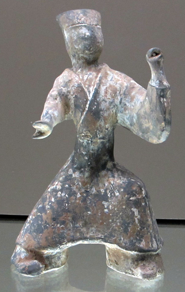 Museo Cernuschi, Parigi